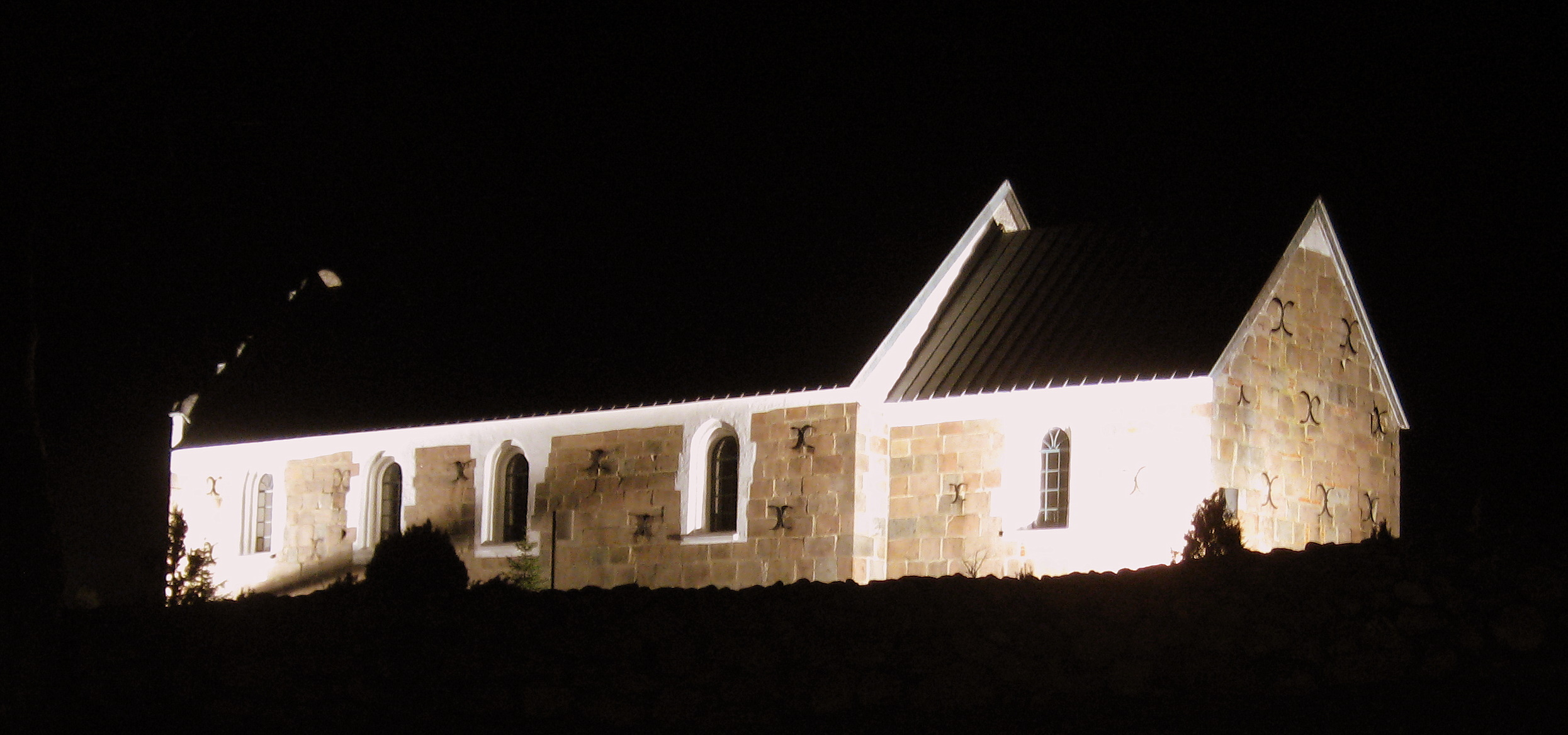 Ugilt Kirke, Hjørring Kommune